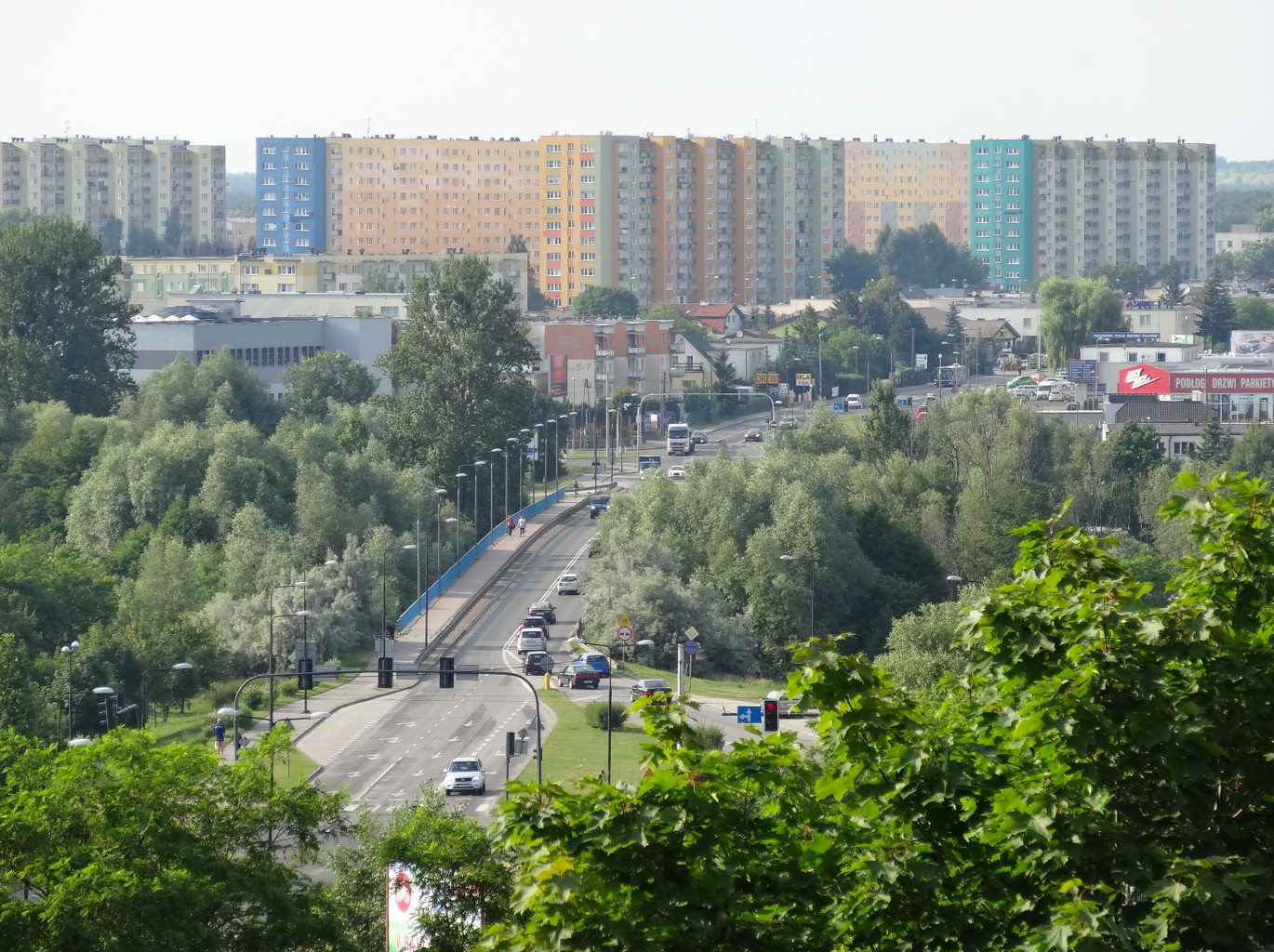 Widok ze Zbocza Bydgoskiego (Skarpy Południowej) na północną część miasta Bydgoszczy